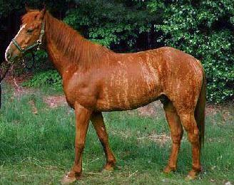 Brindle horse